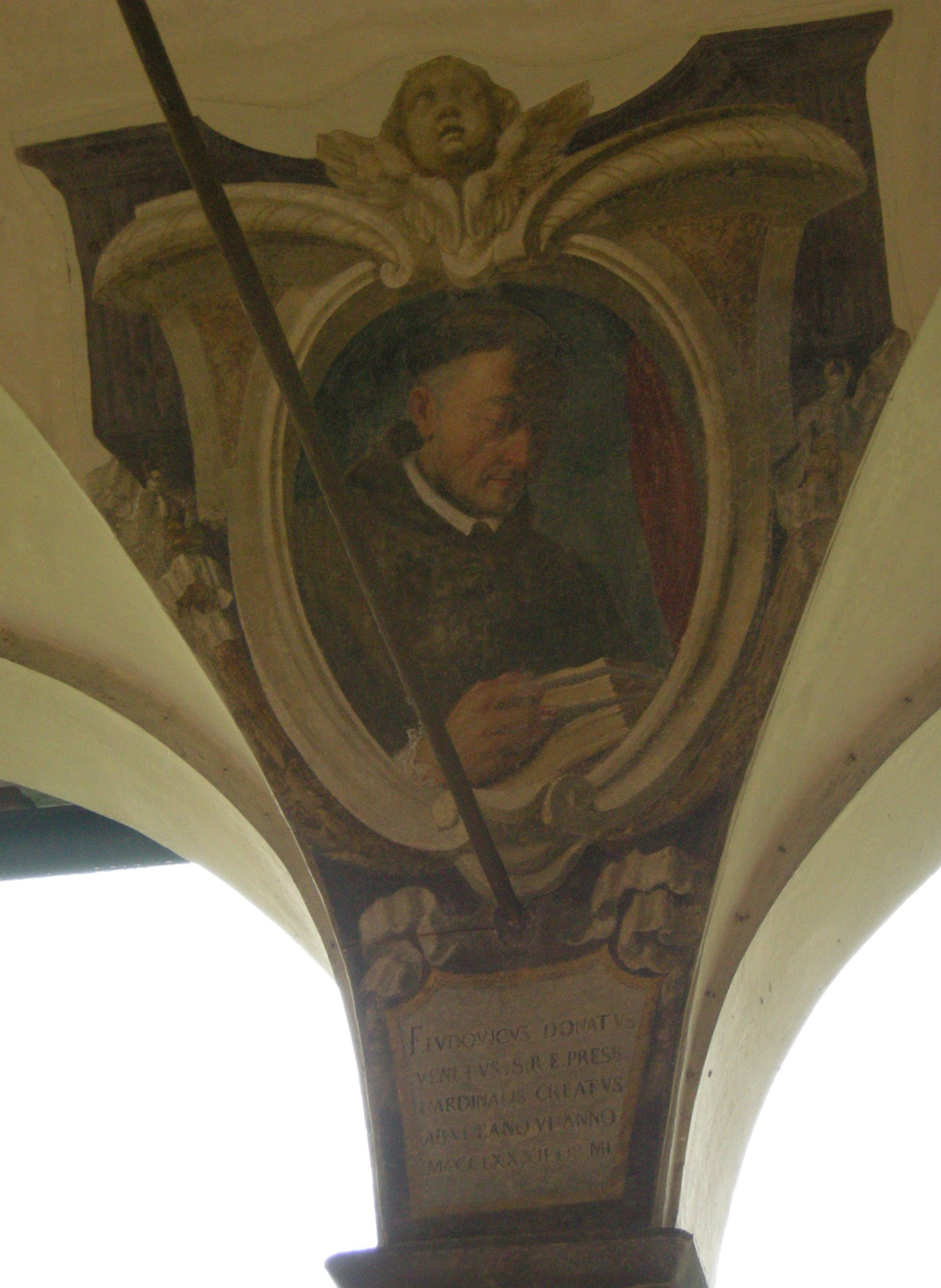 Chiostro di ognissanti, personalità francescane 32 Ludovico Donati